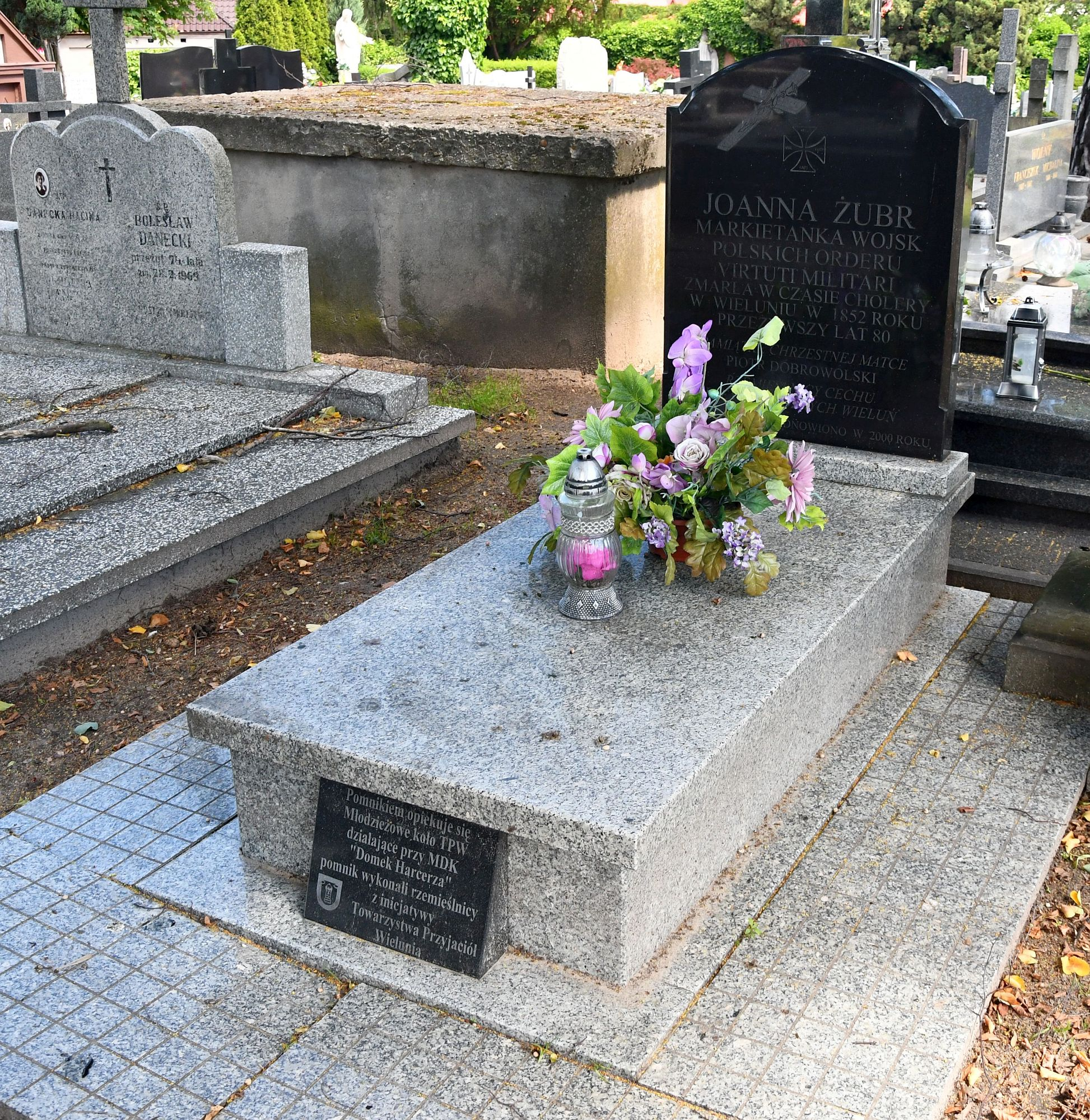 Grób J. Żubr na cmentarzu w Wieluniu, lipiec 2020